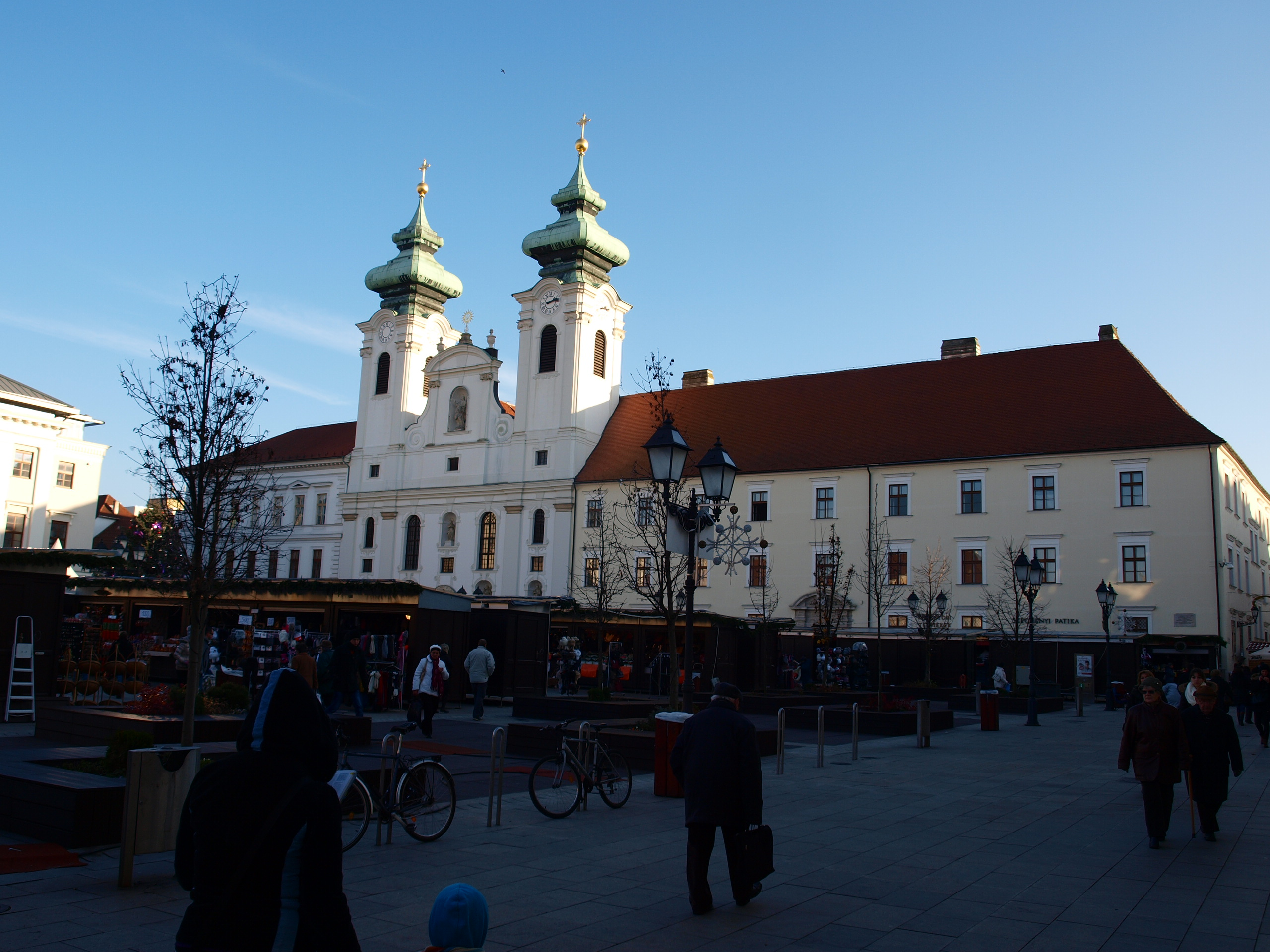 Győr náměstí